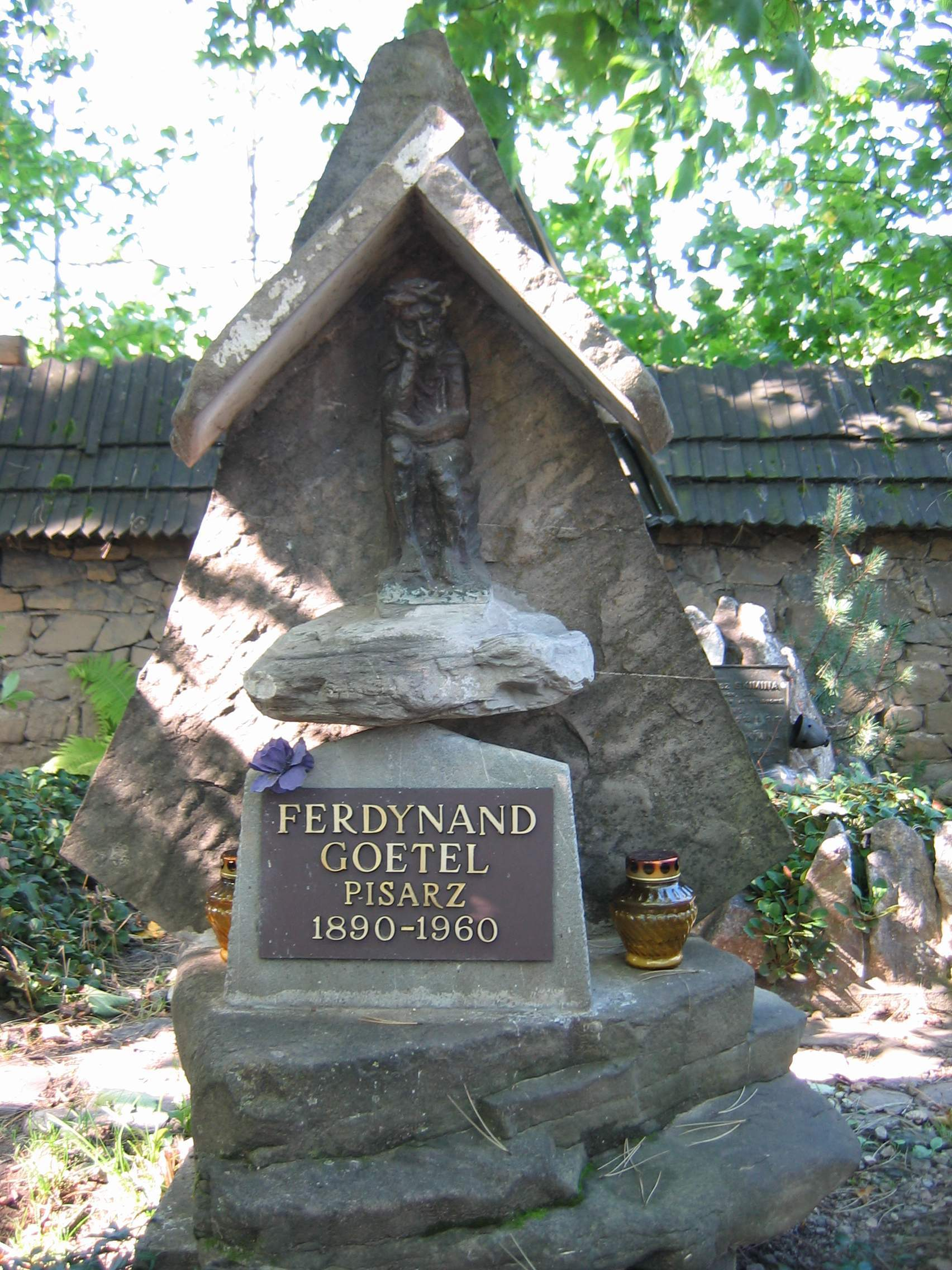 Nagrobek Ferdynanda Goetla na cmentarzu na Pęksowym Brzysku w Zakopanem author:user:Mathiasrex Maciej Szczepańczyk